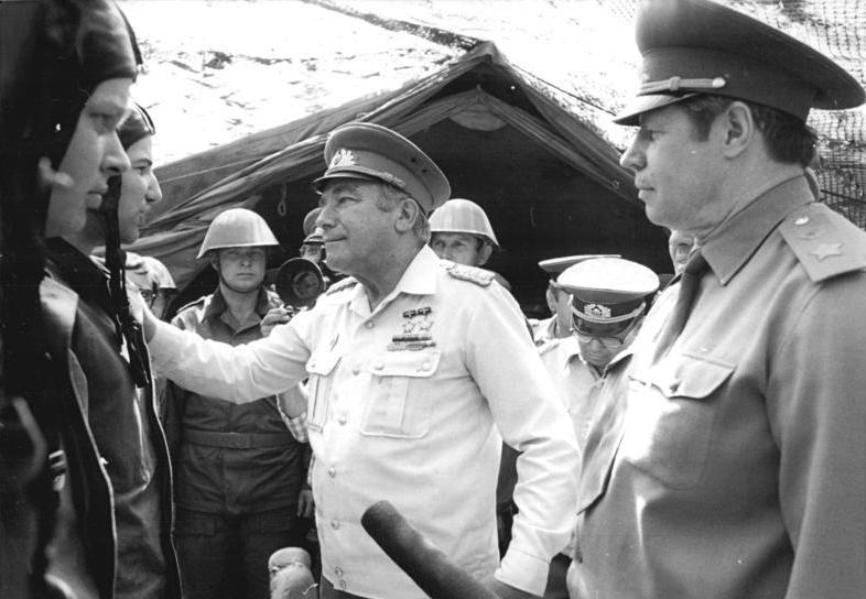 Hoffmann bei Truppenteil "Willi Schröder" ADN-ZB Settnik 29.6.81 DDR: Armeegeneral Heinz Hoffmann, Mitglied des Politbüros des ZK der SED (Mitte) und Minister für Nationale Verteidigung, besuchte Fla-Raketentruppen der Luftstreitkräfte-Luftverteidigung und Einheiten der Truppenluftabwehr der Landstreitkräfte der NVA. Hier ein Gespräch mit Angehörigen des Truppenteils " Willi Schröder", an dem auch der Oberkommandierende der GSSD, Armeegeneral Michail Saizew (r.), teilnahm.